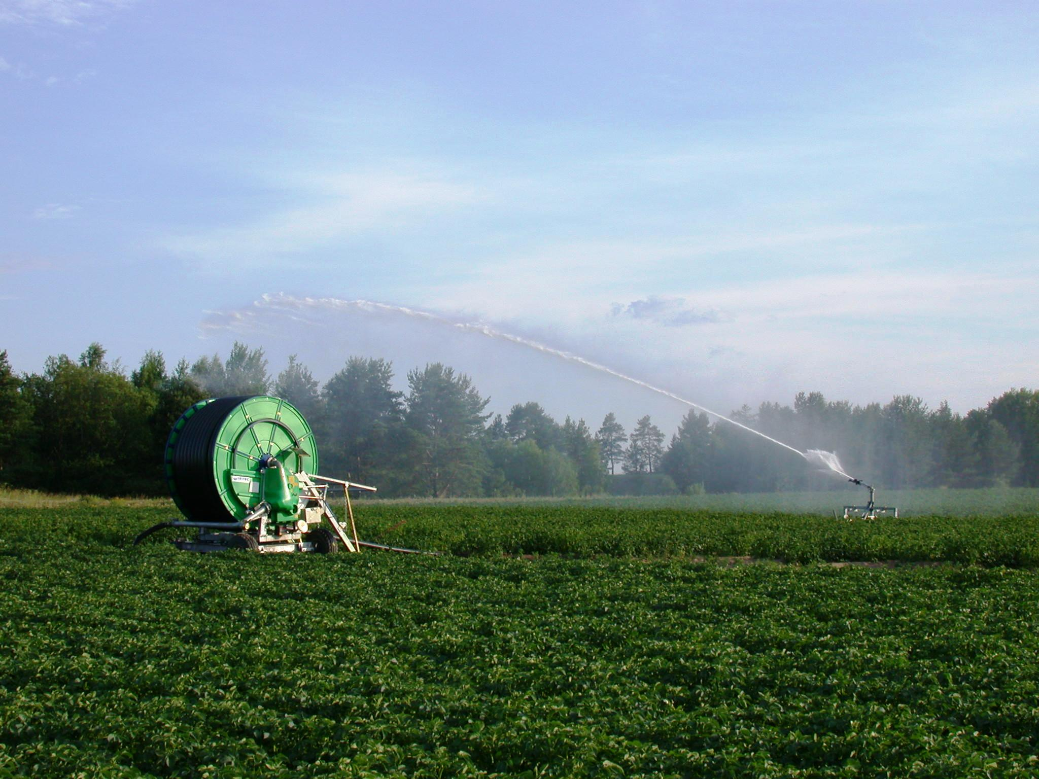 Aspersor tipo cañón autopropulsado en operación Mobile irrigation equipment on a field outside Motala, Sweden. Photo by Riggwelter, July 5, 2006.